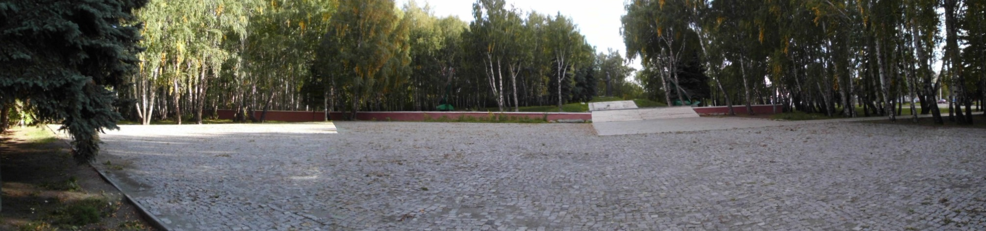 Панорамный снимок. Слева братские могилы погибших в эвакогоспиталях Челябинска в годы ВОВ, справа памятник "Скорбящие матери". Лесное кладбище, Челябинск, Челябинская область.